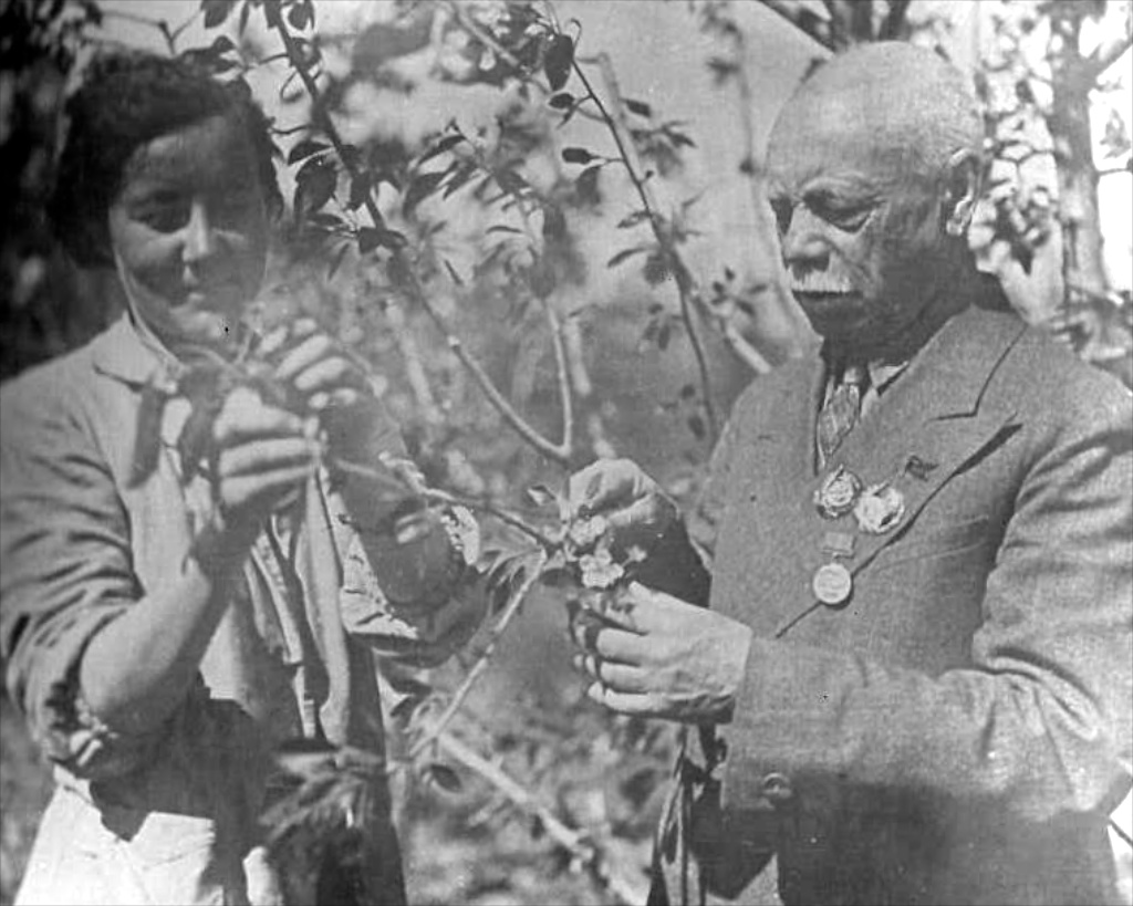 1939 г., на практике на Опытной станции им. Р. Р. Шредера